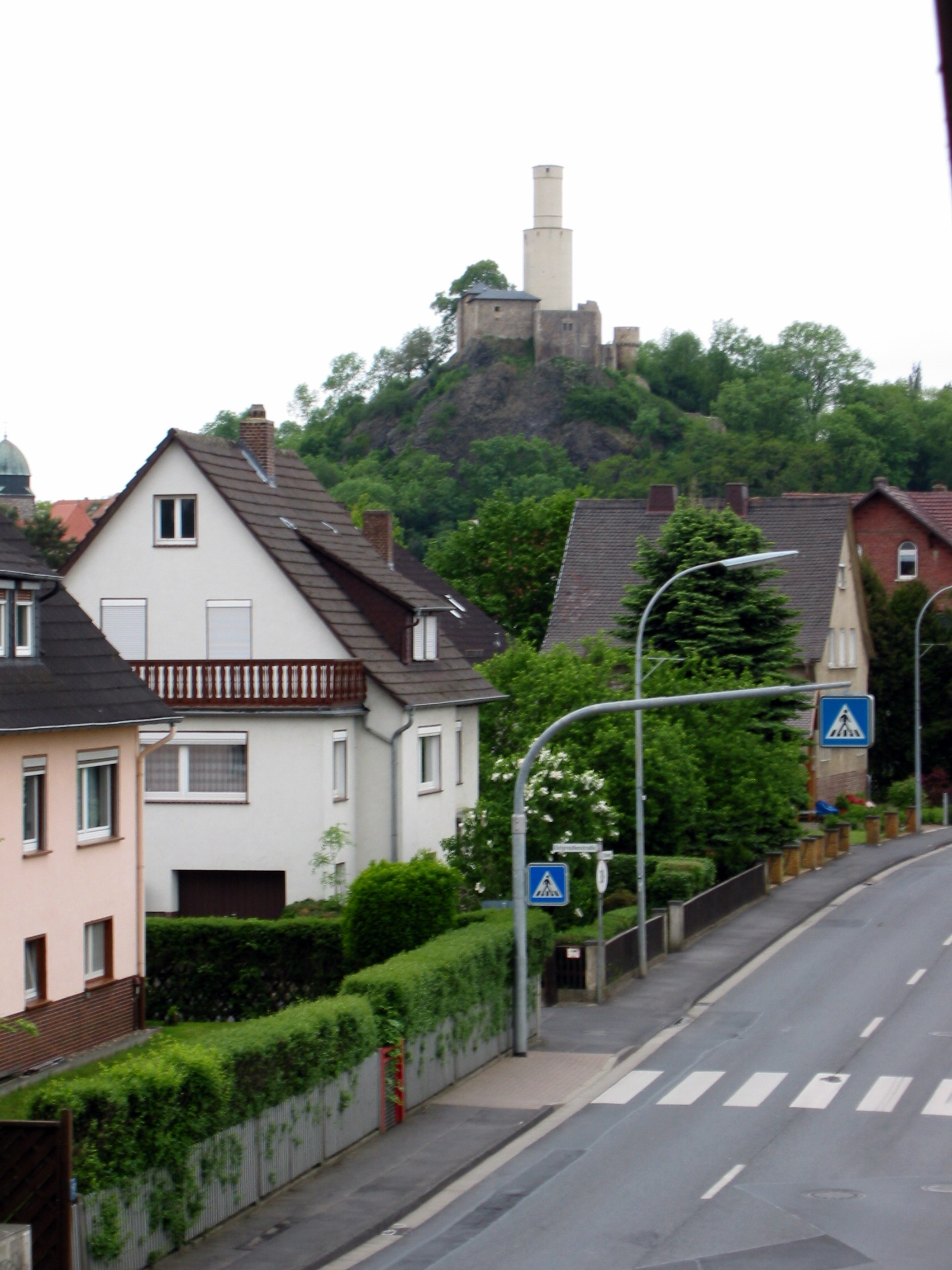 Felsberg (Hesse)